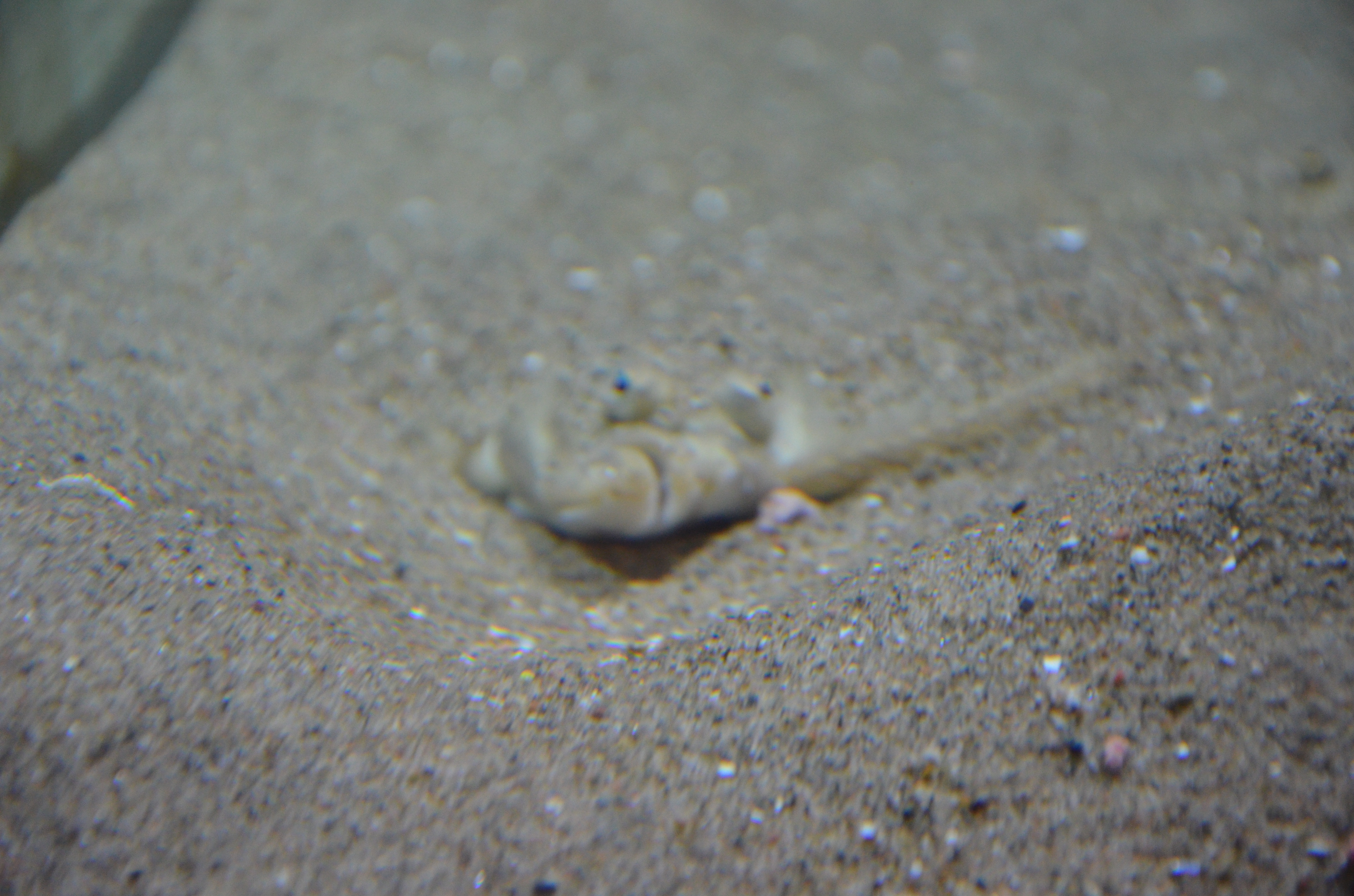 Piggvar nedgrävd i sandbotten